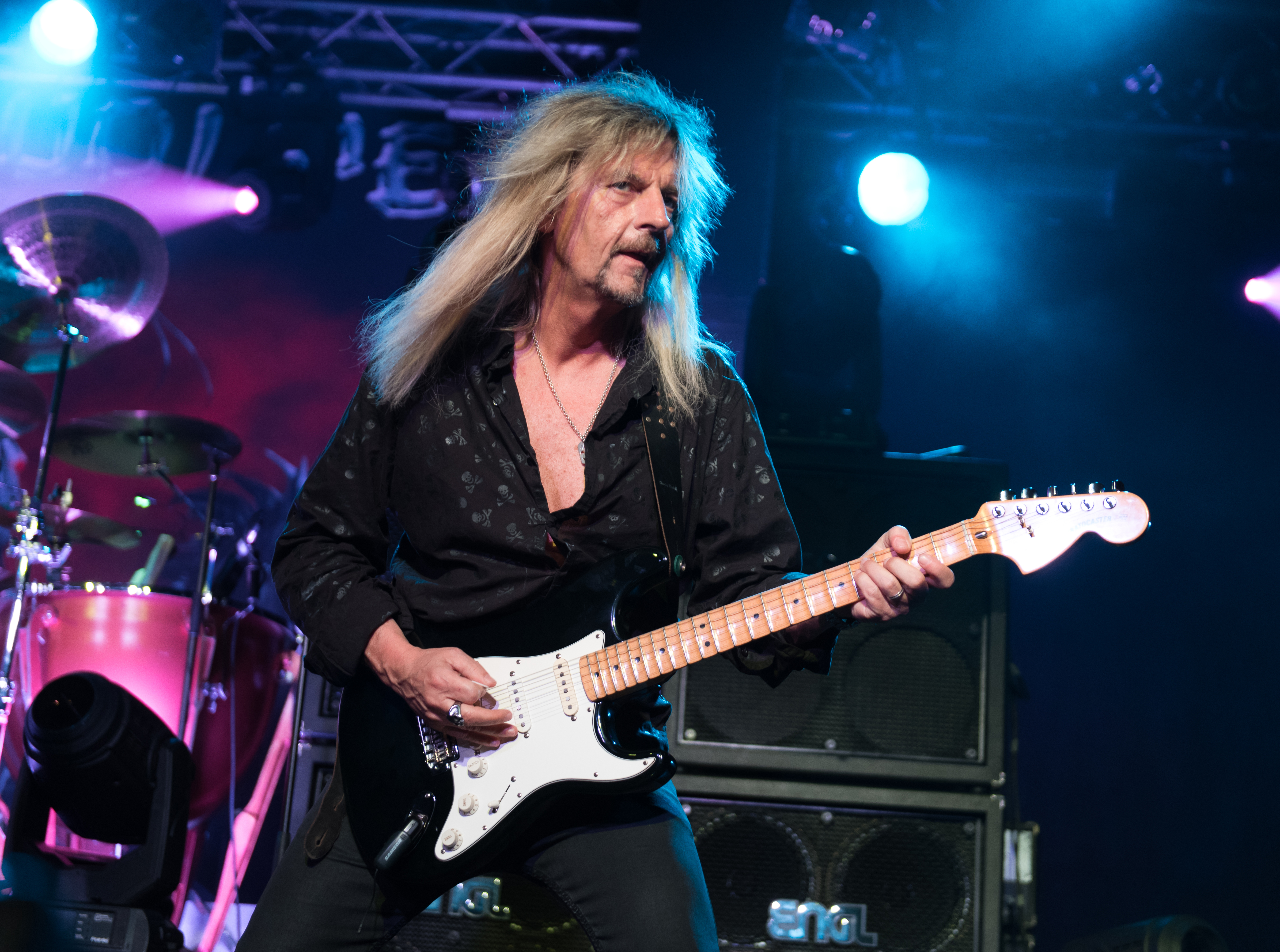 Axel Rudi Pell in der Großen Freiheit 36 in Hamburg 2018